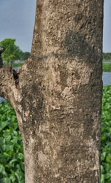 Teak or Sagwan Tectona grandis in Kolkata, West Bengal, India.